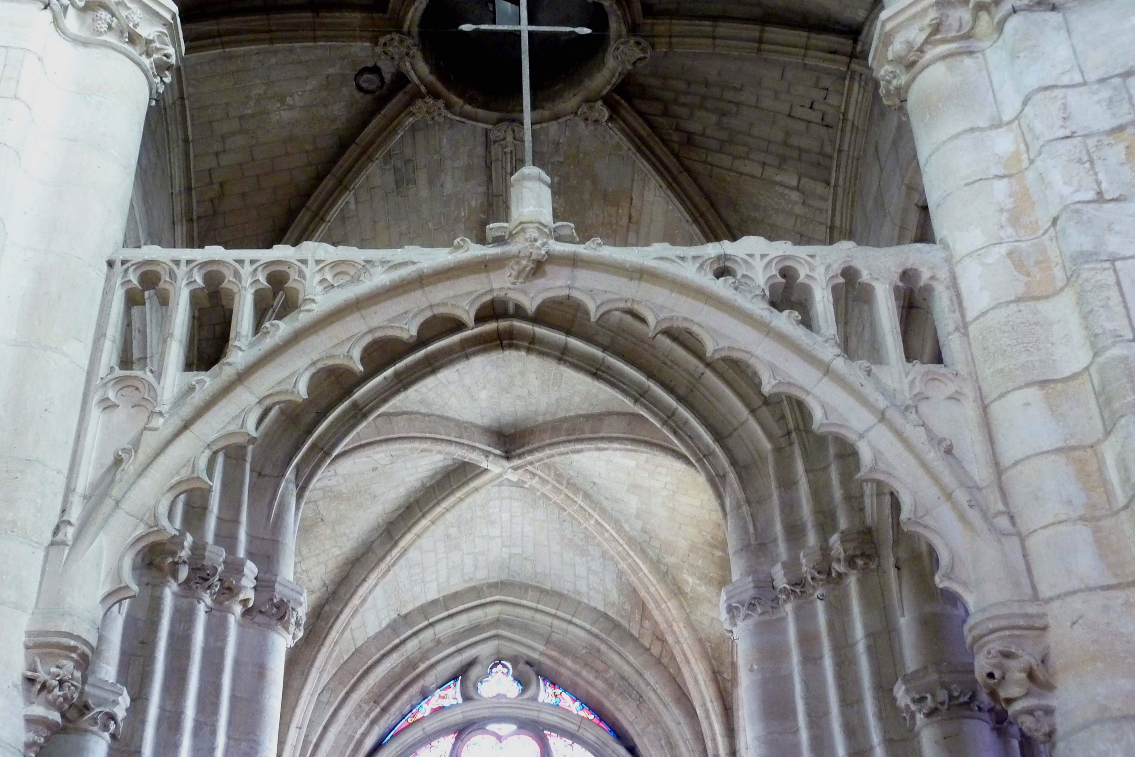 Katholische Kirche Notre-Dame-de-l’Assomption in Champagne-sur-Oise (Département Val-d’Oise) in der Region Île-de-France (Frankreich), Triumphbogen (Zackenbogen) und Arkaturen mit genasten Spitzbogen (Nonnenkopf)